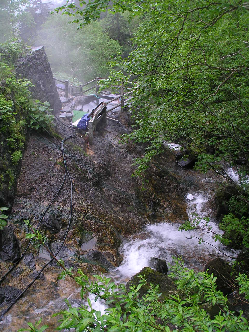 吹上げ温泉